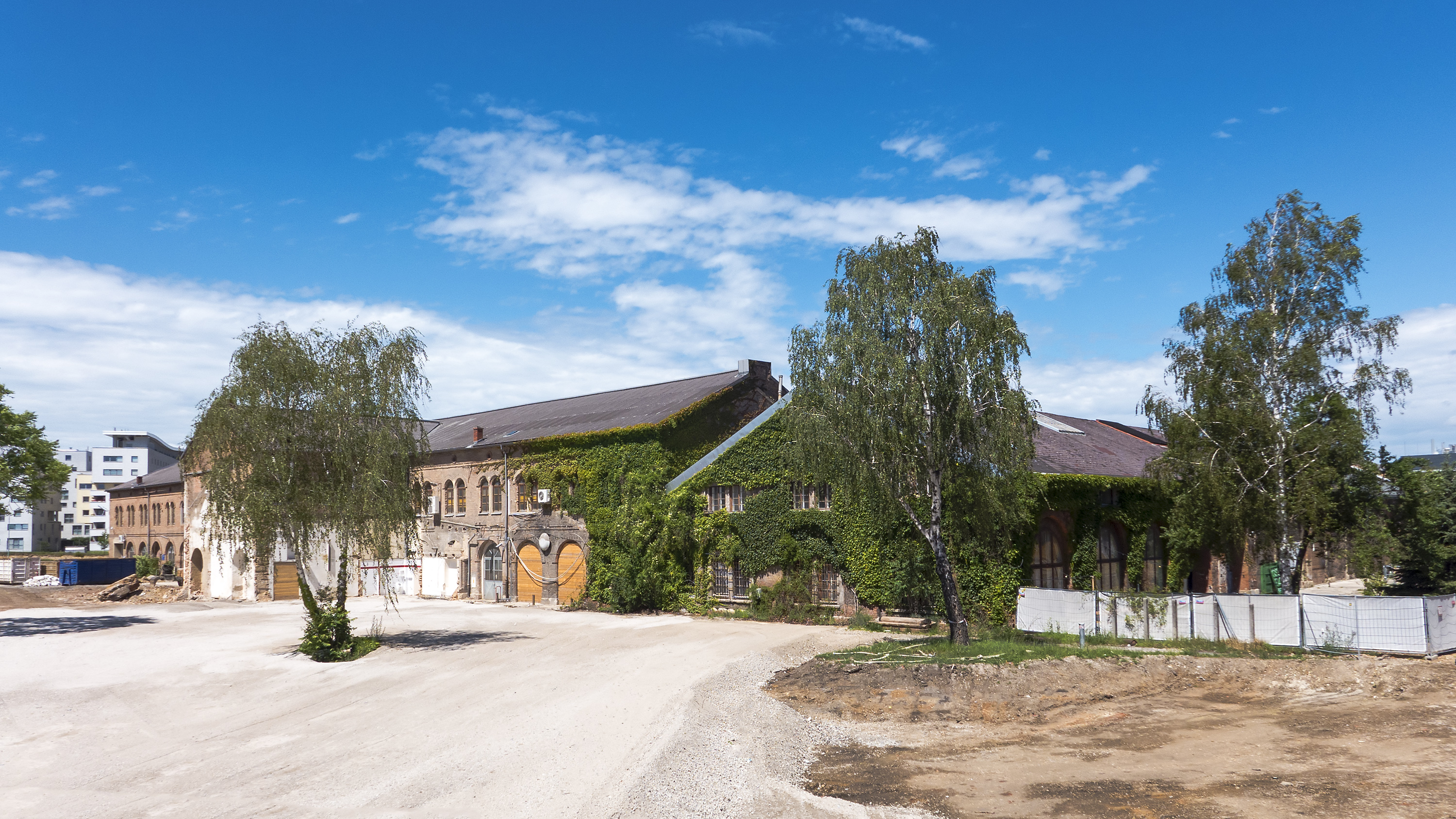 Neues Landgut in Wien 10